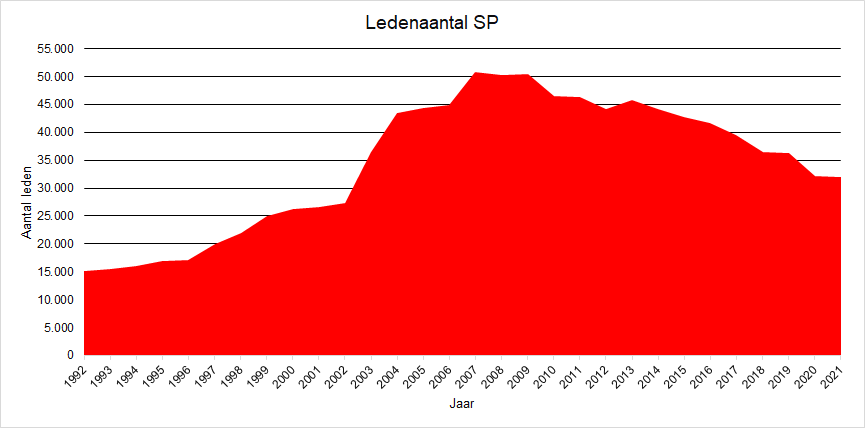 Ledenaantal van de Nederlandse Socialistische Partij van 1992 tot 2007 gebaseerd op het artikel Socialistische Partij (Nederland).